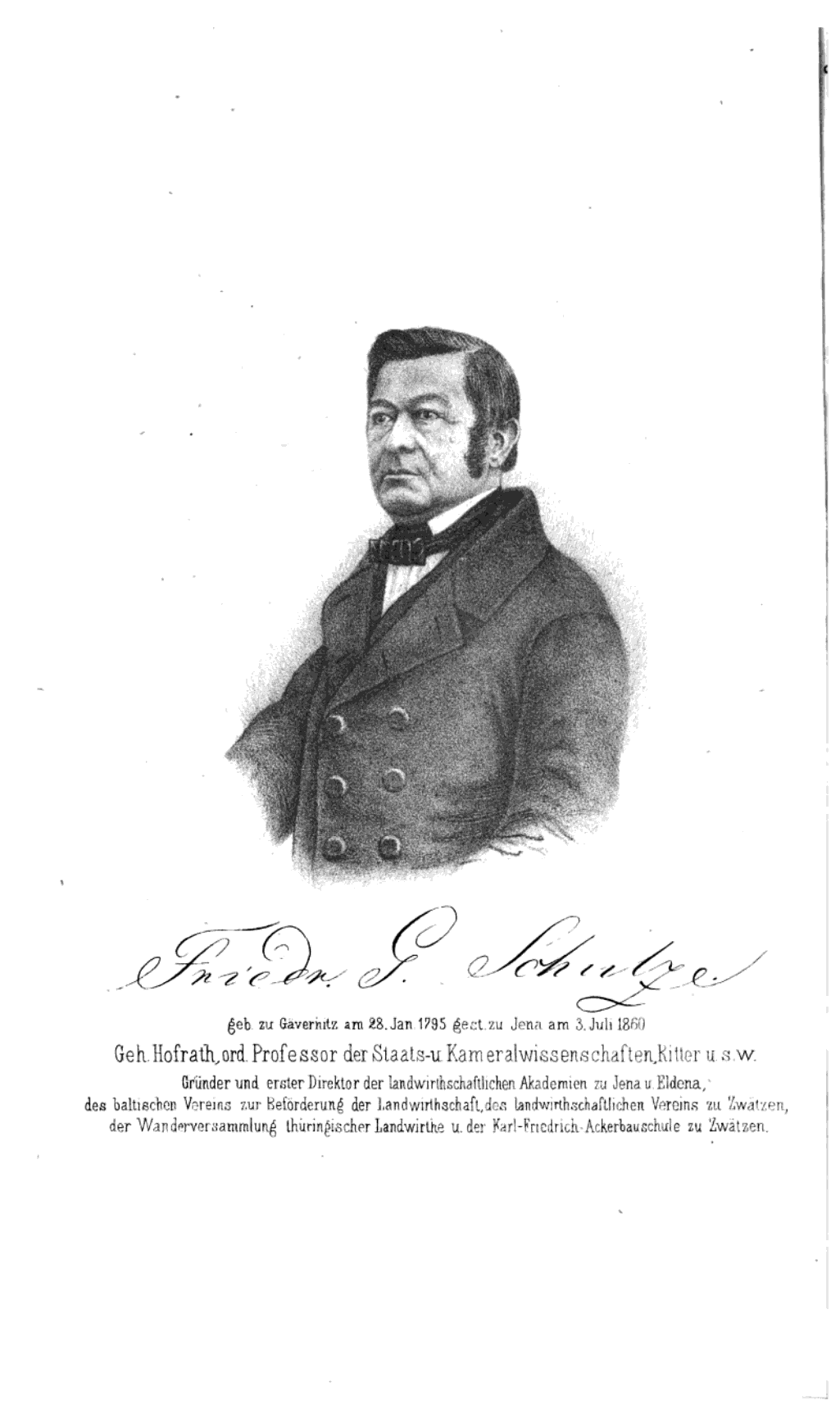 Friedrich Gottlob Schulze (* 28. Januar 1795 in Obergävernitz bei Meißen; † 3. Juli 1860 in Jena)